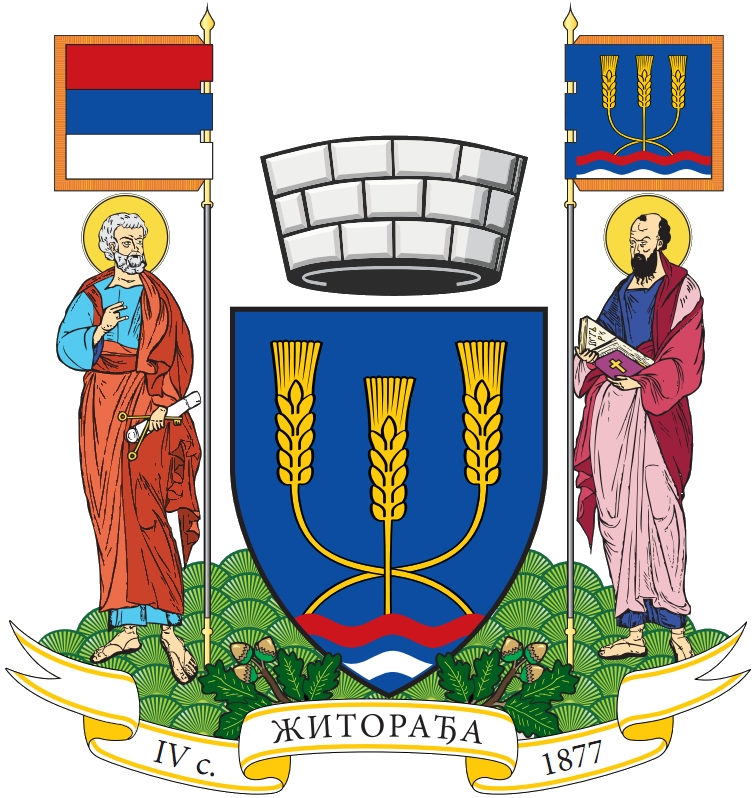 Велики грб - грб највишег ранга, репрезентује општину у посебним и другим утврђеним случајевима и на за то одређеним местима. У средини је основни грб (мали грб) општине Житорађа, који представља штит. Изнад штита се налази сребрна бедемска круна без видљивих мерлона (зуба) који представљају територијалну ознаку која хералдички говори да се ради о територији са око 20.000 становника. Као држачи штита појављује се на хералдички десној страни (левој од стране посматрача) Свети апостол Петар, а са леве Свети апостол Павле, као директна асоцијација на општинску славу. Ту су и стегови - хералдичке заставе, и то стег Републике Србије као надређене територијалне инстанце - хералдички десно, и историјски стег - хералдички лево. Стег лево је квадратан, и на њему се налази застава Општине Житорађа. Травом обрасли брежуљкасти постамент и у дну штита симетрично постављене храстове гранчице, симболишу равничарско – брдовити терен наше општине. Цела композиција великог грба стоји на ленти у чијем централном делу је исписан назив општине, лево је исписано римским словима „IV c“ што означава 4. век, од када датирају први писани подаци о Житорађи. На десном делу ленте је исписана 1877. Година, година ослобођења Житорађе од турака. Трака са именом општине није обавезни елемент грба, али лепо заокружују његову визуелну форму и завршава ову хералдичку причу о грбу општине Житорађа. Графичко решење знамења Општине Житорађа урадио је Иван Сарајчић, а по замисли радника Општинске управе општине Житорађа, Љубише Стевановића. Грб је званично усвојен на седници Скупштине општине Житорађа, дана 15.10.2010. године. Употреба је регулисана Одлуком о употреби имена, грба и заставе општине Житорађа.